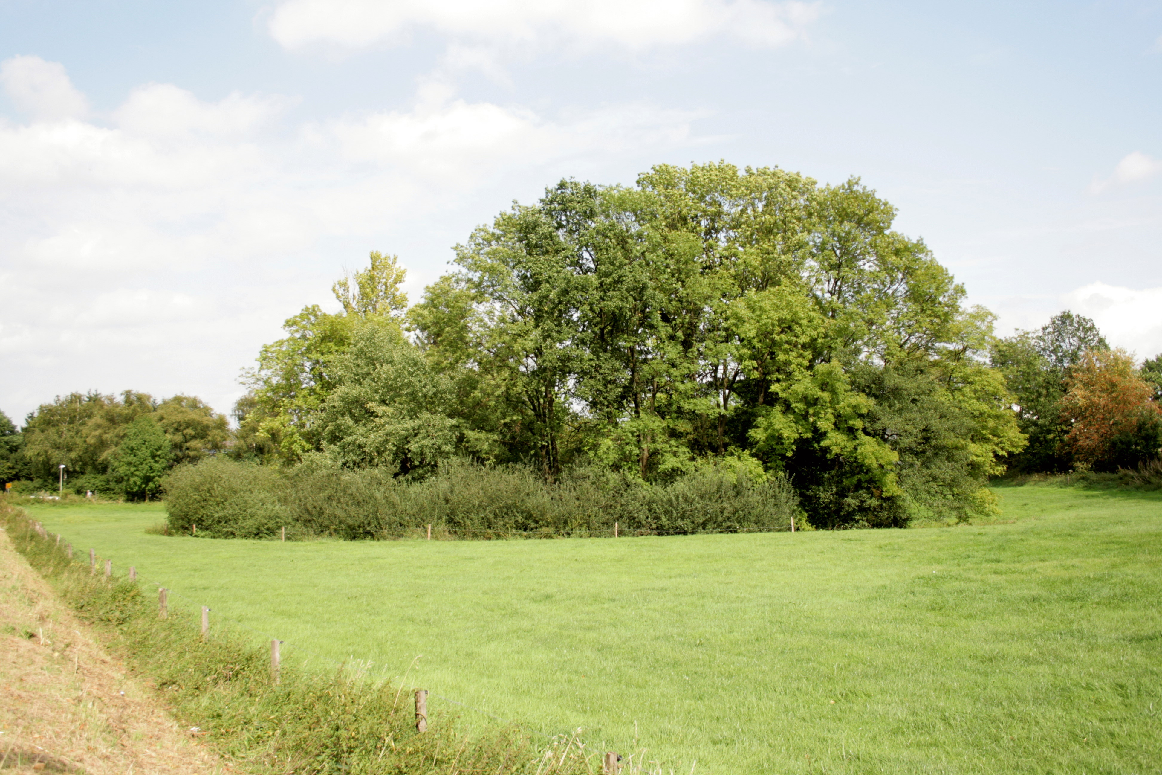 Wasserburg Gevern in Neuenrade-Küntrop